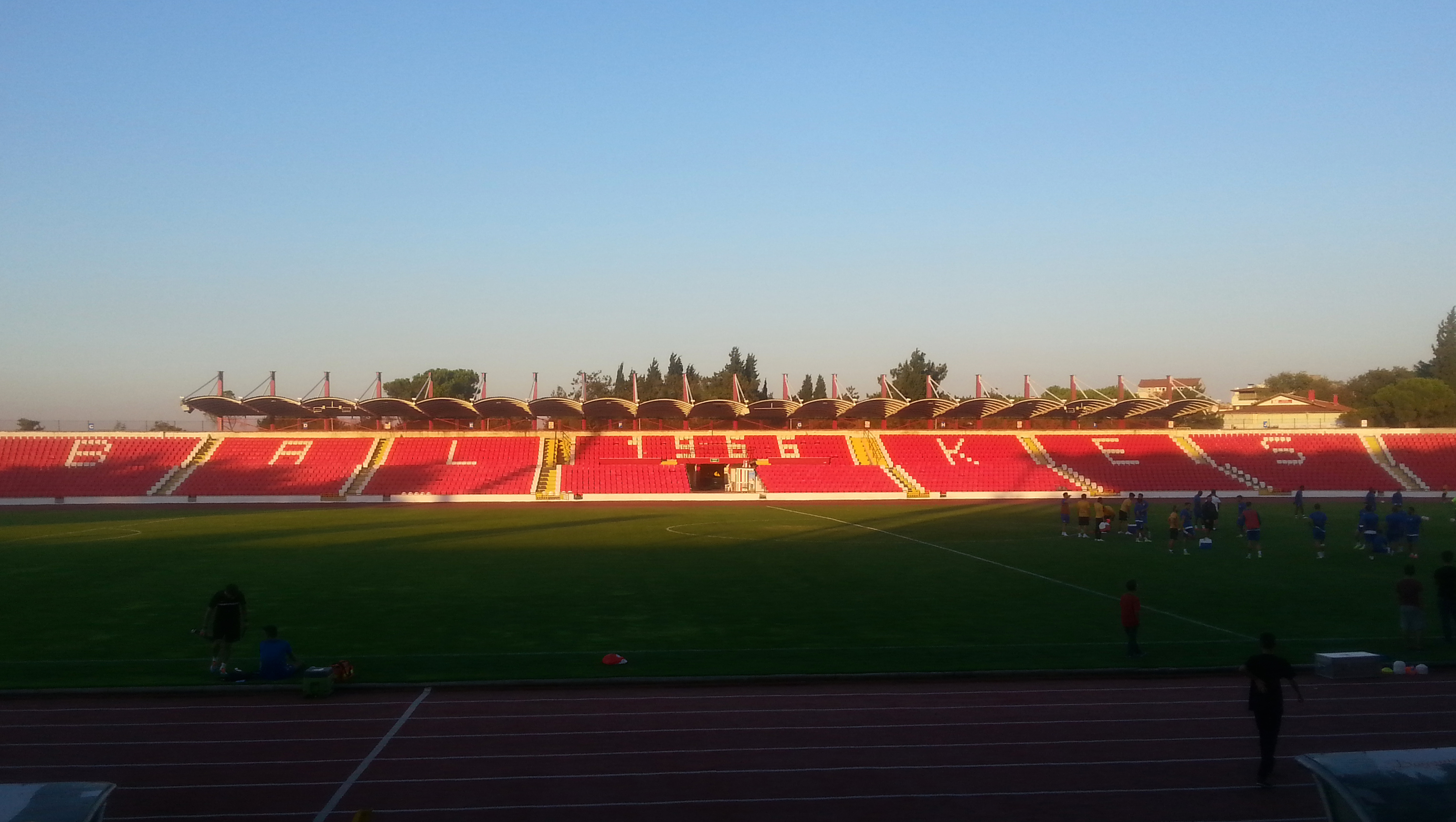 Balıkesir Atatürk Stadyumu'nun maraton tribünü.